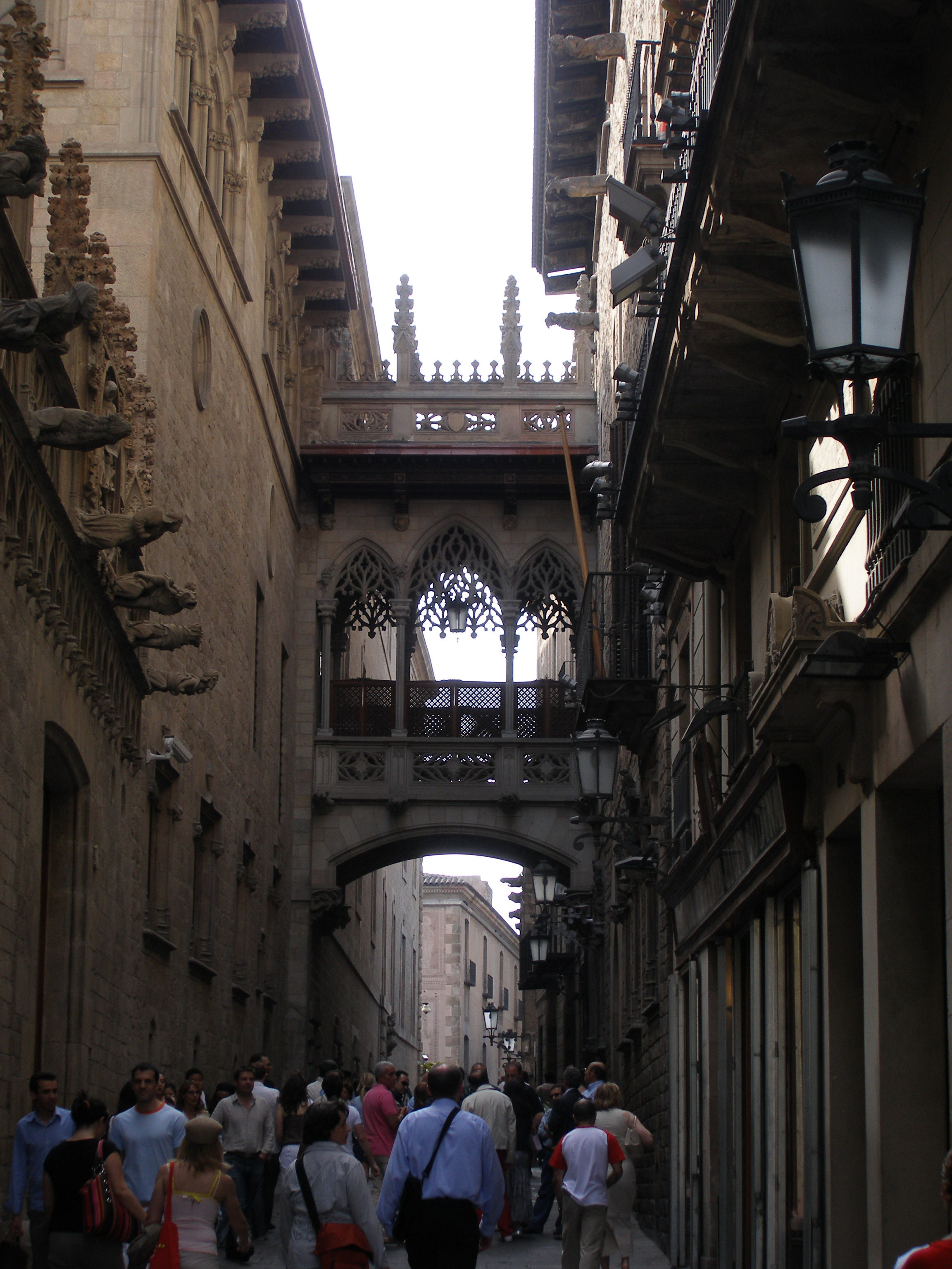 Barri.Gotic.Seufzerbruecke